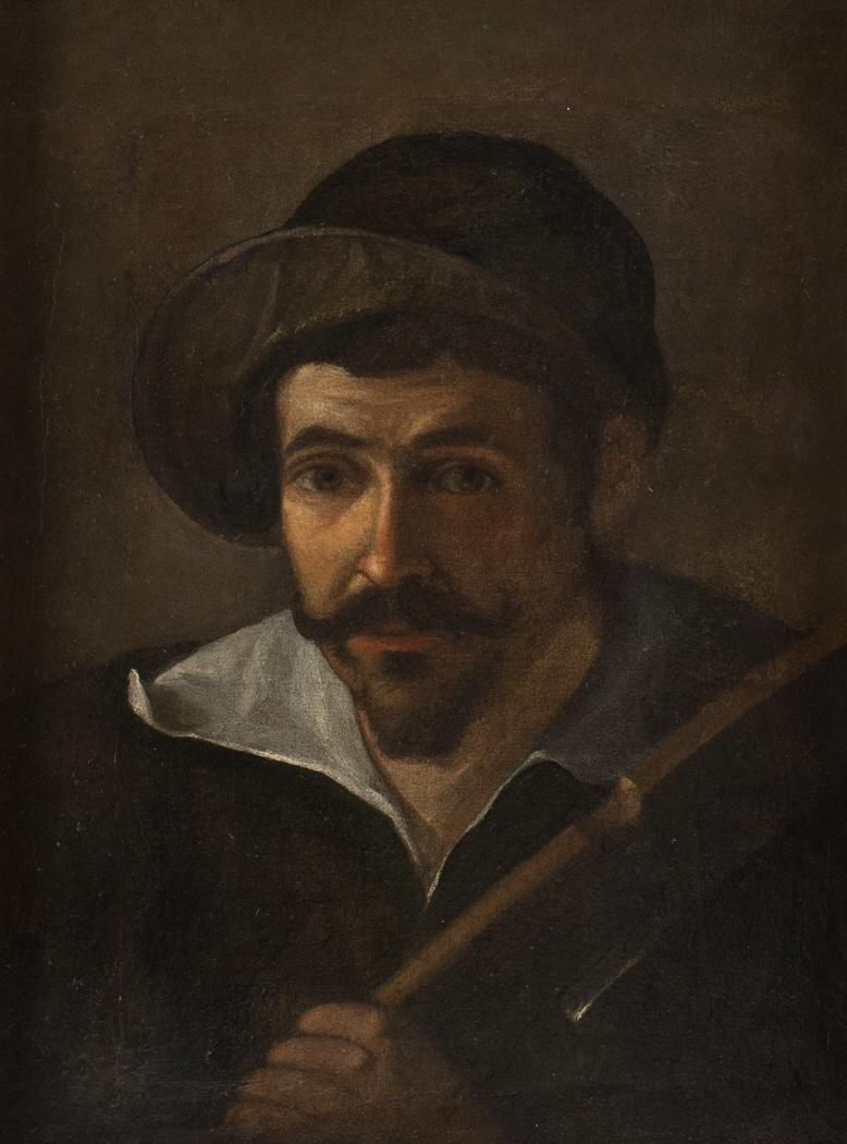 Retrato del arcabucero de Felipe IV Alonso Martínez de Espinar, óleo sobre lienzo, 62 x 40 cm, Toledo, Museo del Greco